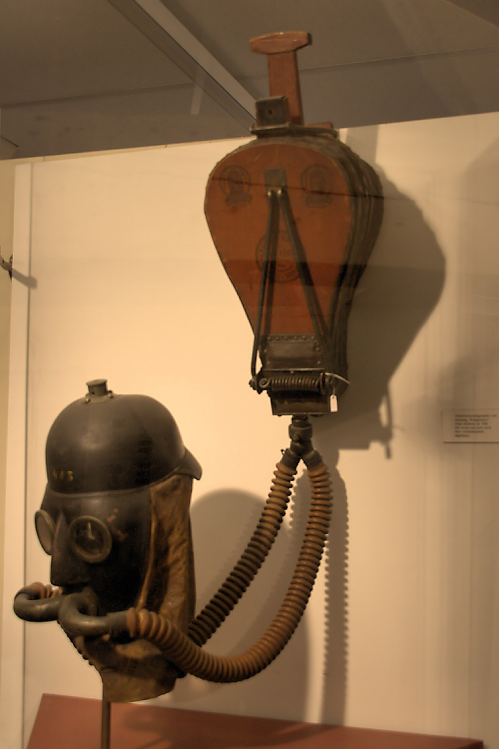 Persluchttoestel, oud model, Duits fabrikaat. Foto gemaakt in Nationaal Brandweermuseum, Hellevoetsluis